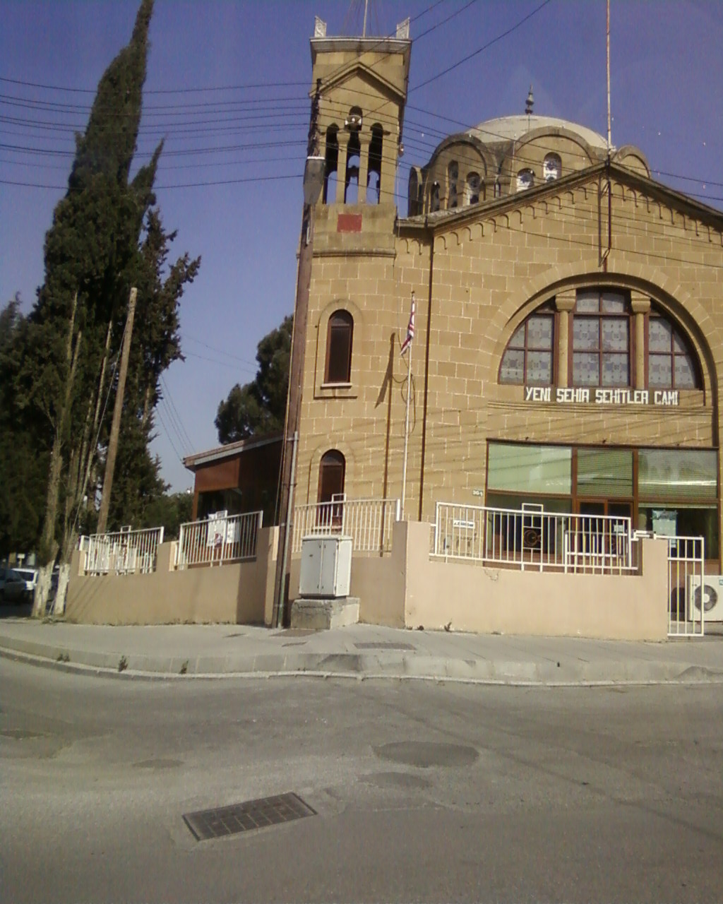 KKTC'nin başkenti Lefkoşa'da bulunan Yenişehir Şehirler Camii.